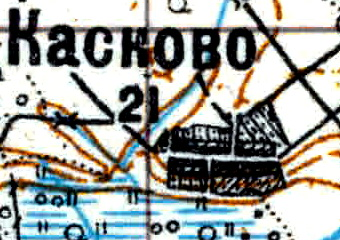 Топографическая карта Ленинградской области, квадрат Vc-29 (Батецкая), деревня Костково